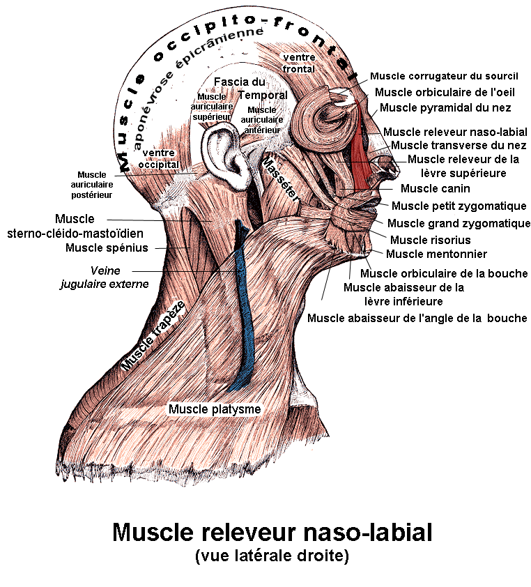 Muscle releveur naso-labial. Anatomie humaine